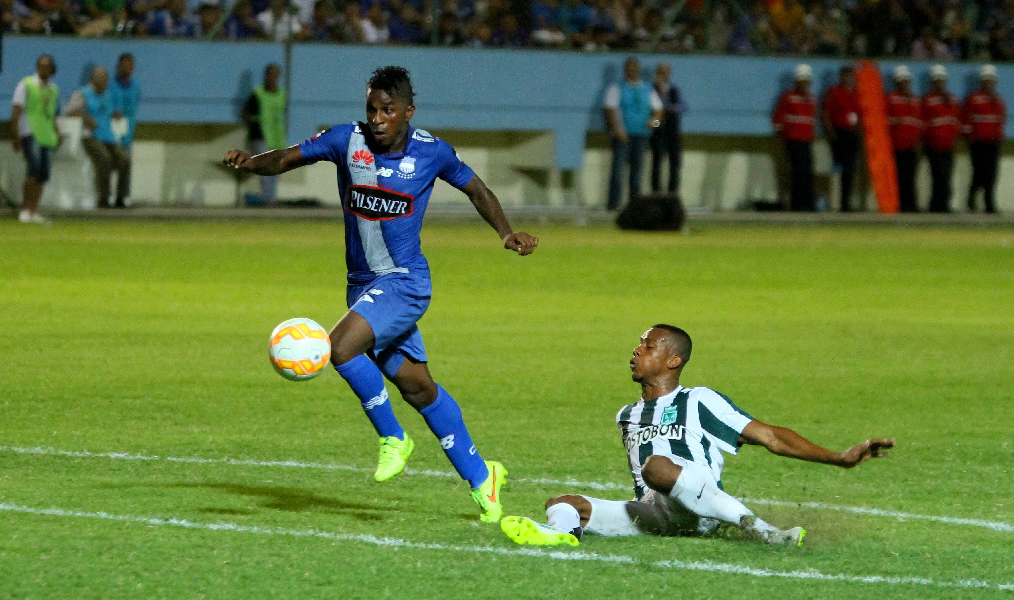 Manta, 07 de may (Andes).-Emelec enfrenta a Atlético Nacional de Medellin en el partido de ida de los Octavos en la Copa Libertadores Foto:César Muñoz/Andes